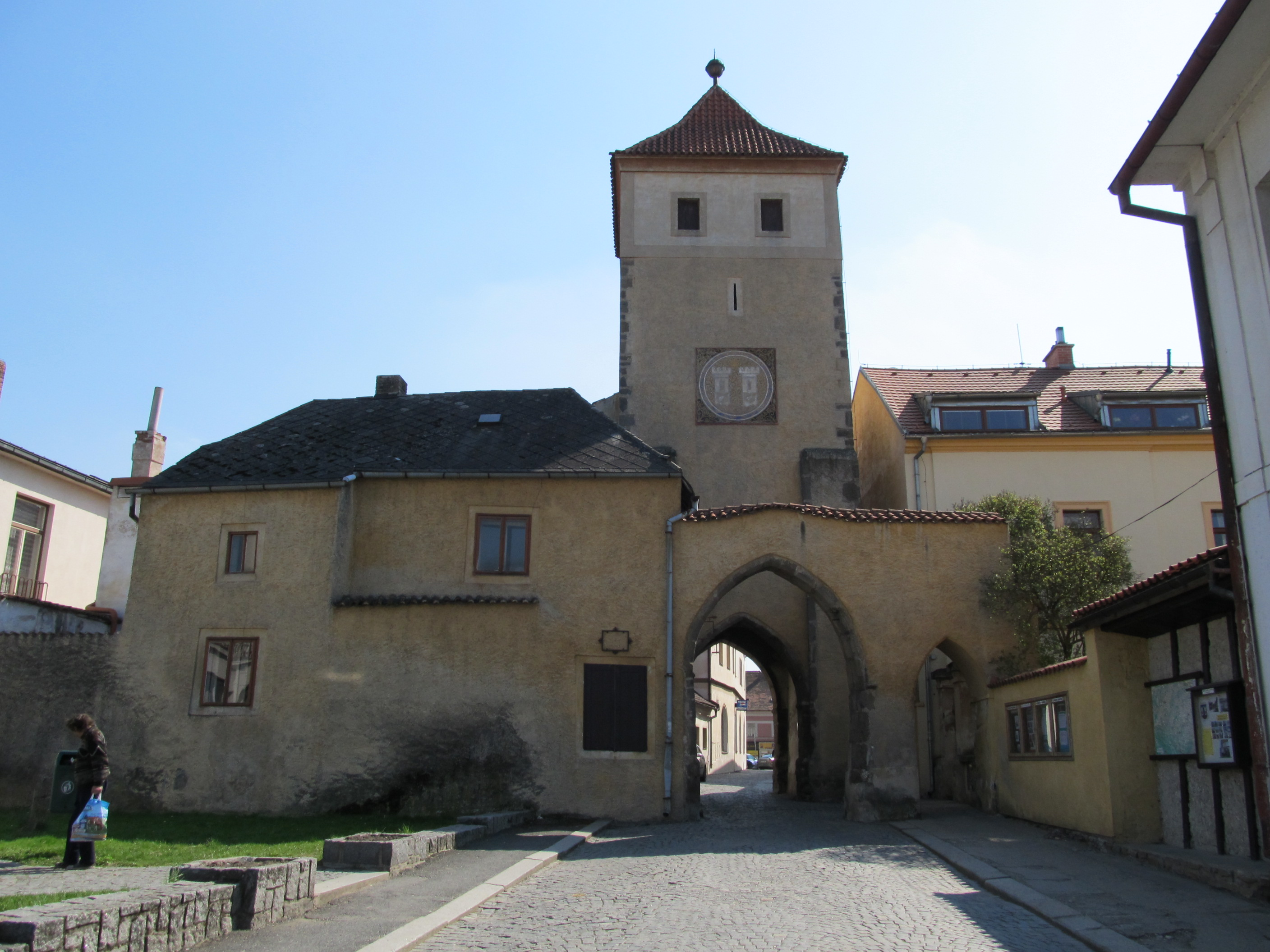 Horažďovice - Červená (Pražská) brána s předbraním